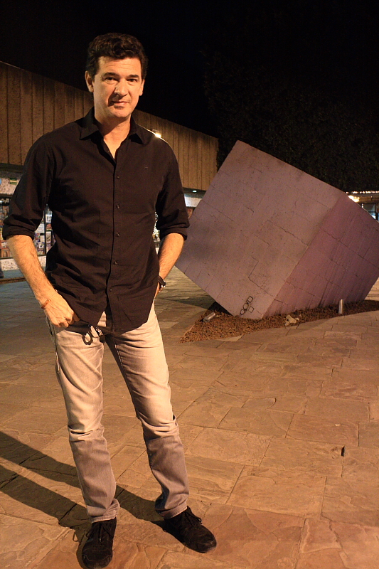 Julio Medem en su visita a la Cineteca Nacional, México, 2010.